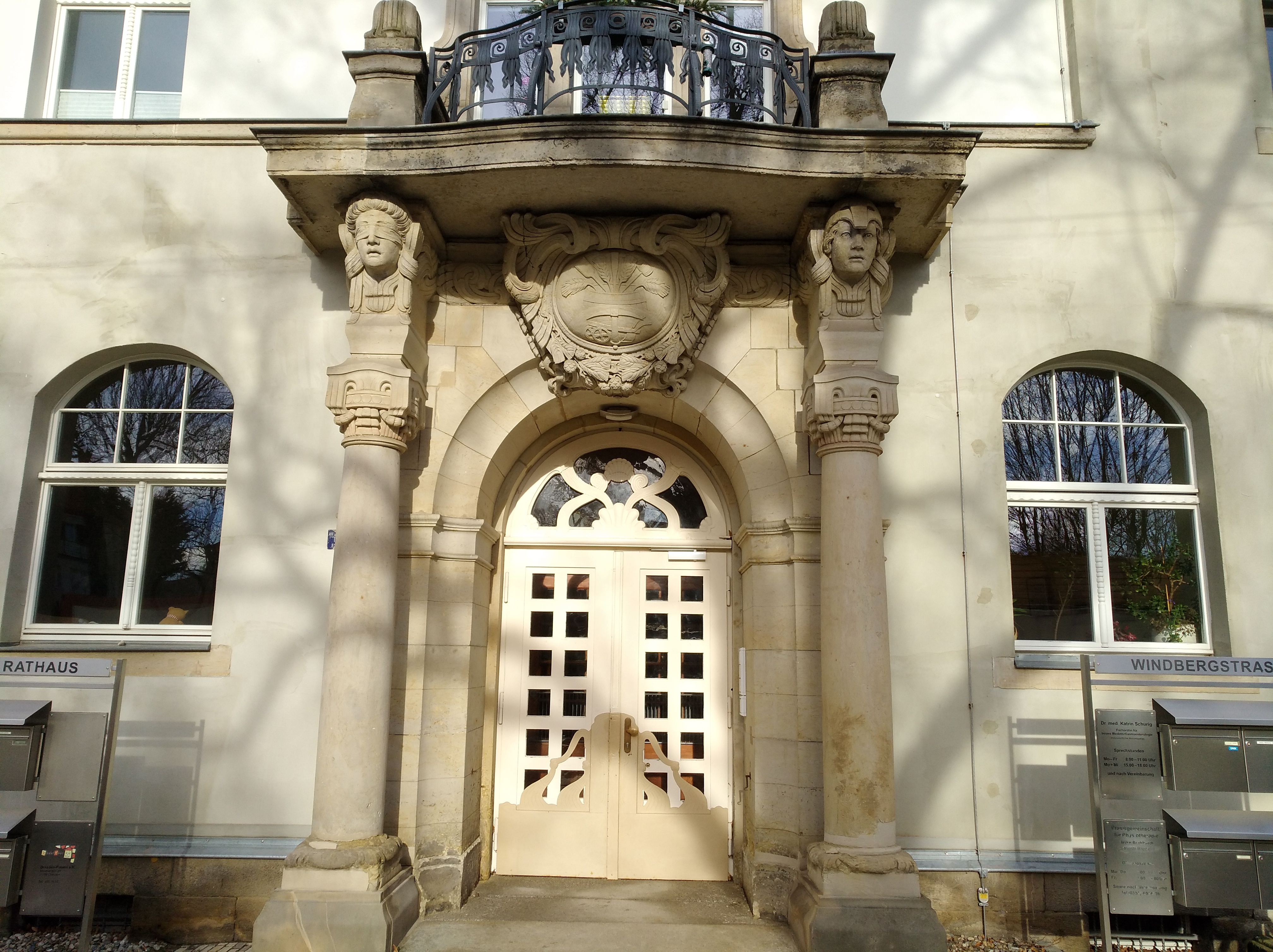 Eingangsportal ehem. Rathaus Coschütz